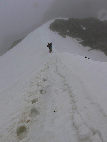 17 juin, alpinisme dans les pyrénées.